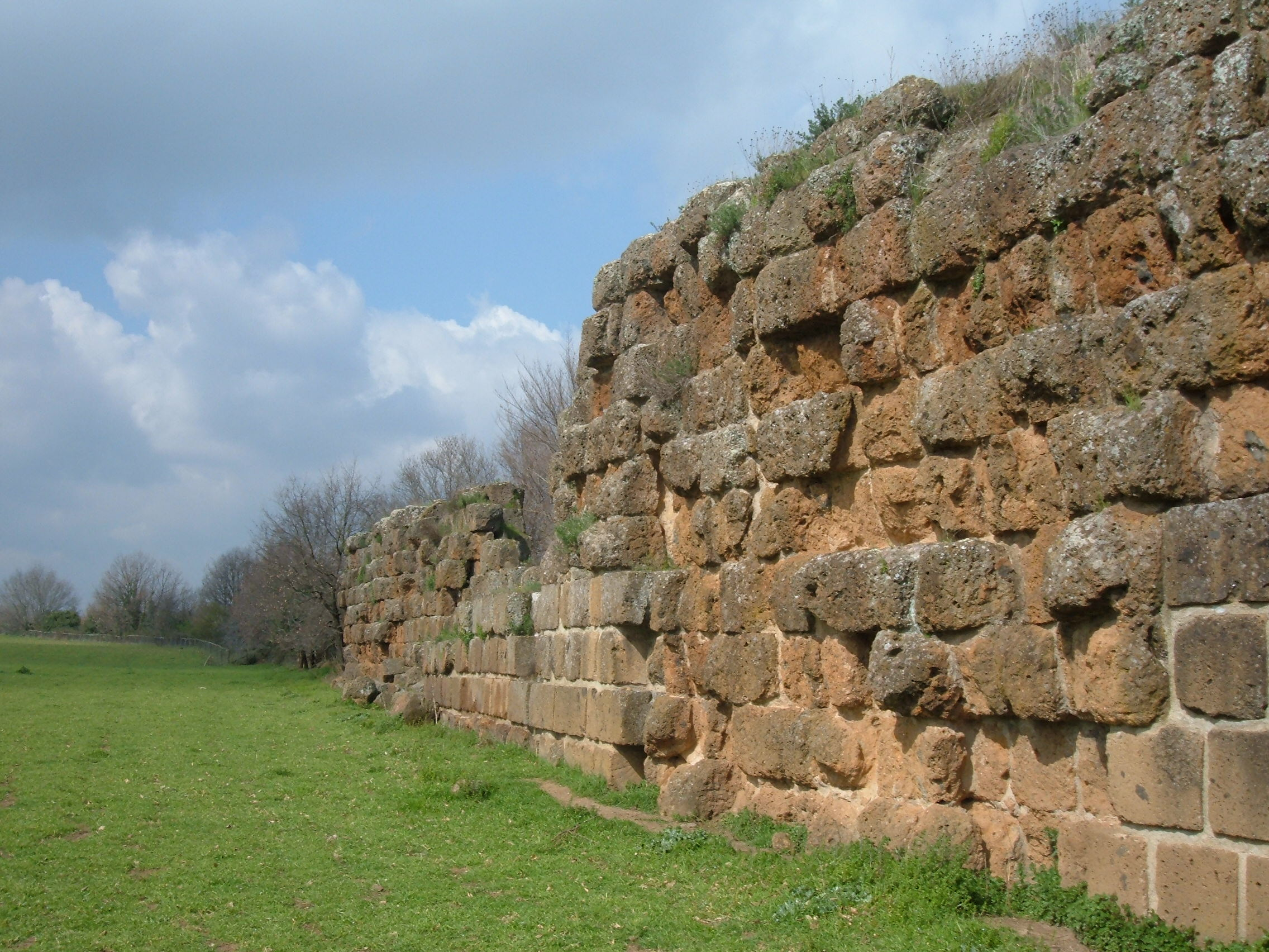 Mura di Falerii Novi